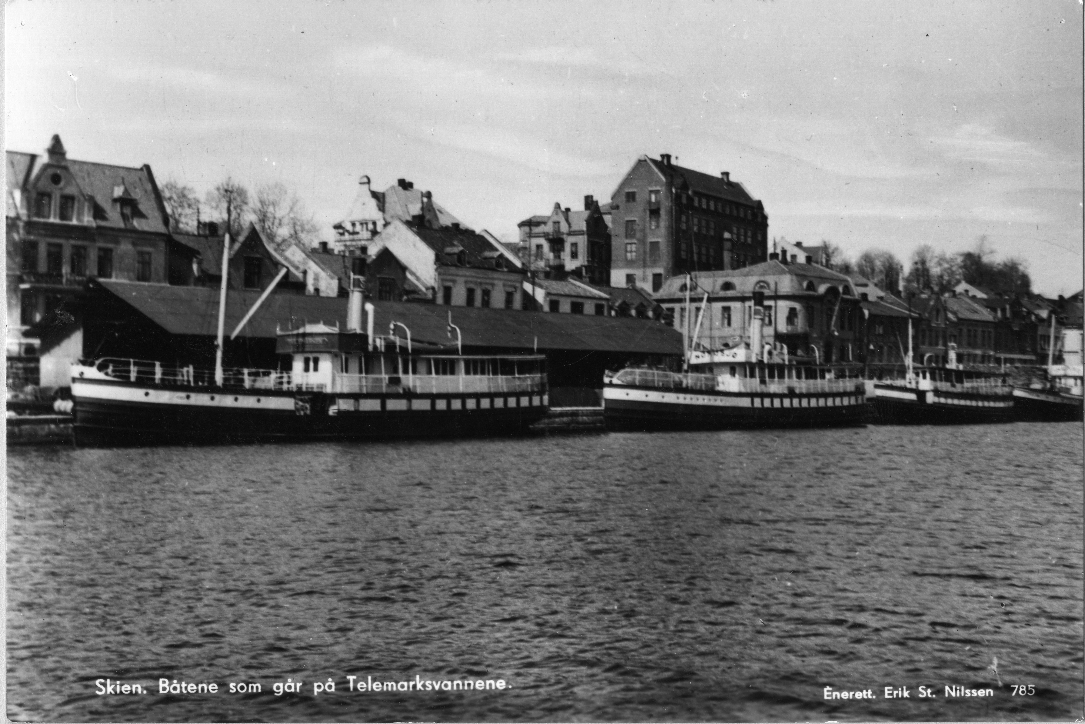 Bildet er hentet fra Arkivverket. Fra venstre: D/S Telemarken D/S Nordsjø D/S Gvarv Arkivinstitusjon : Statsarkivet i Kongsberg Arkivnavn : Skien -Telemarkens Dampskipsselskap Sted : Norge, Telemark, Skien, Hjellen Emneord: Telemarkskanalen, Båt, Sluser Avbildet